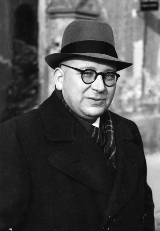 Adolf Süsterhenn Illus - Hage-Photo Man wirbt für die neue westdeutsche Bundesverfassung Im Bild: Dr. Alfred [korrekt: Adolf] Süsterhenn, (CDU) Minister für Kultus und Justiz in Rheinland-Pfalz, Mitglied des parlamentarischen Rates in Bonn, sprach auf Veranstaltungen der Katholischen Aktion in Heidelberg, Mannheim und Darmstadt über die neue westdeutsche Bundesverfassung 2973-49 [Aufnahme 1949] Abgebildete Personen: Süsterhenn, Adolf Dr.: 1905-1974, Minister für Kultus und Justiz in Rheinland-Pfalz, CDU, Bundesrepublik Deutschland